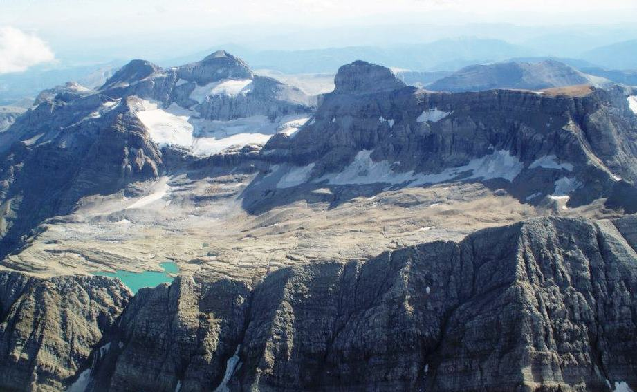 Mt Perdu et son glacier vue d'avion